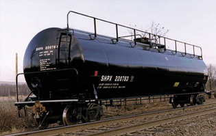 Carro tanque